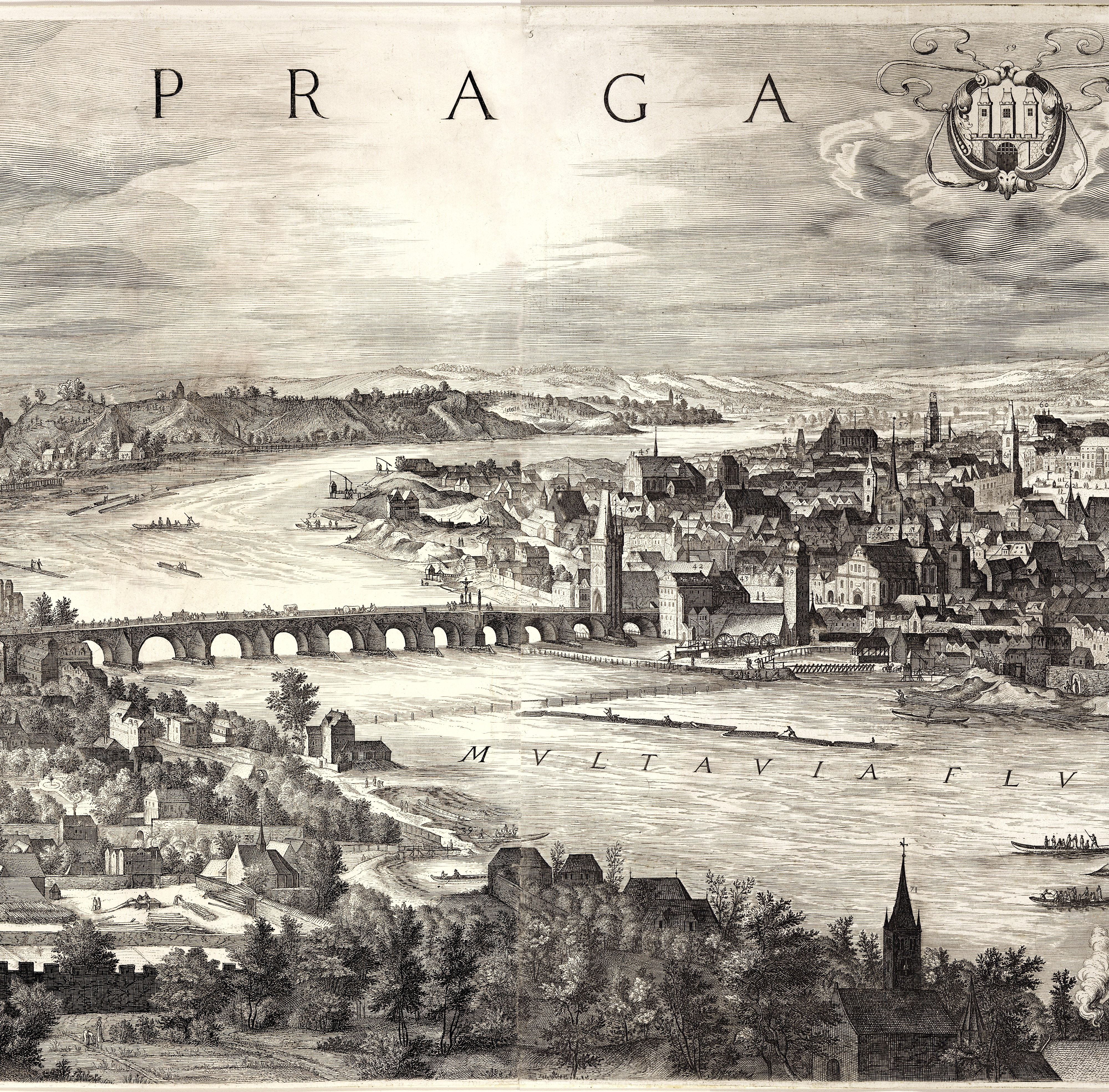 Výřez z tzv. Sadelerova prospektu, který zobrazuje Staré Město a část Malé Strany.